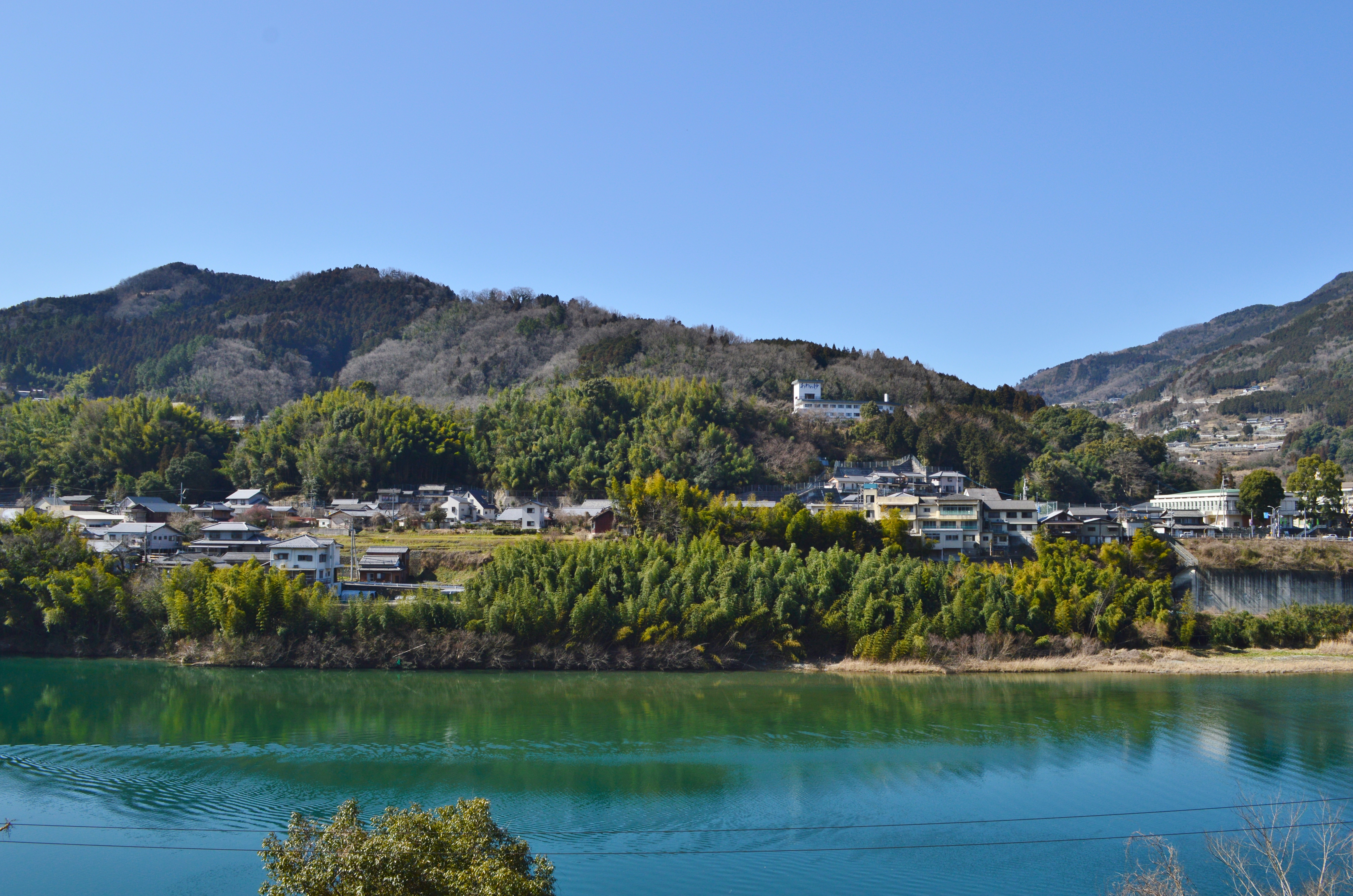 白地城 遠景